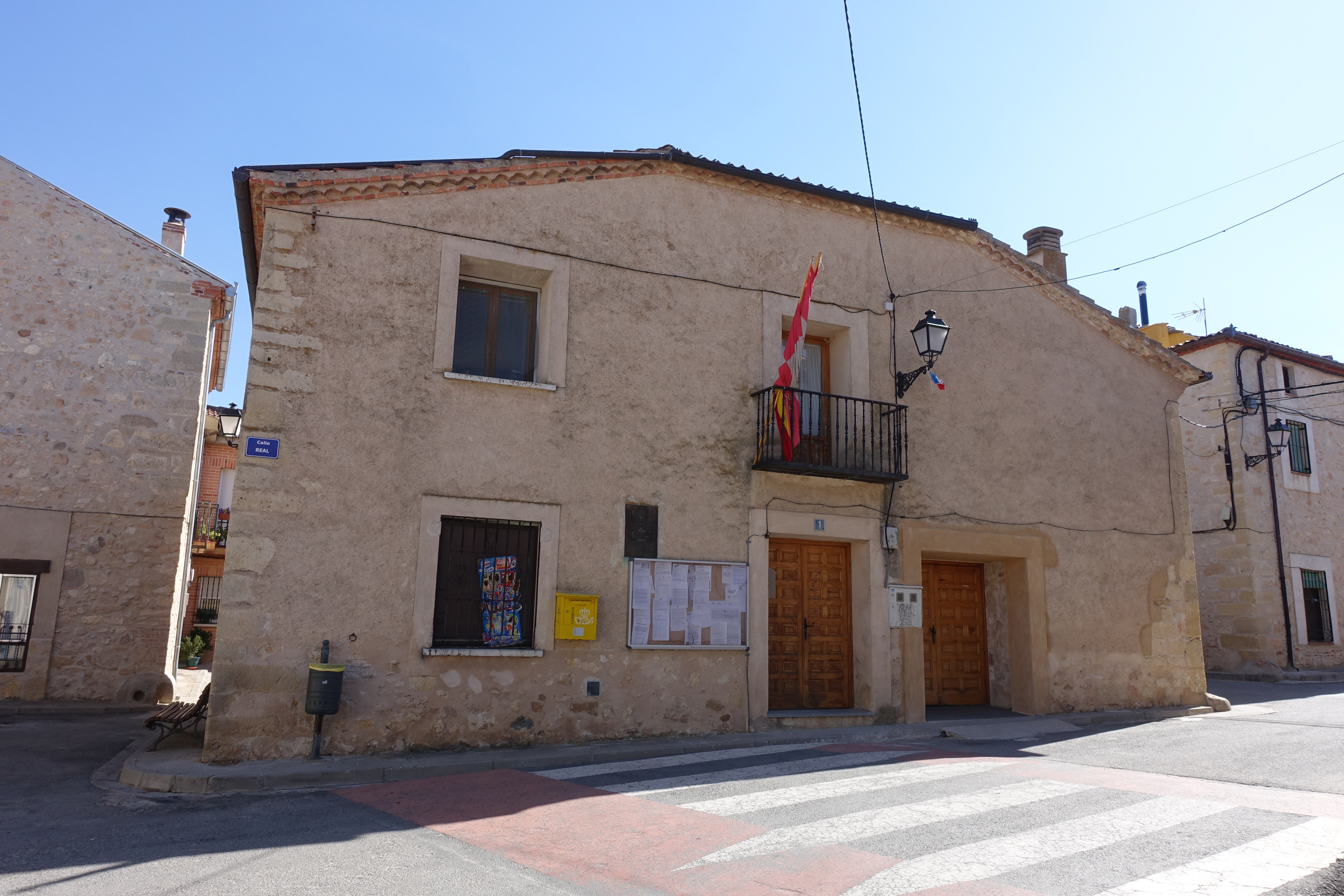 Casa consistorial de Encinillas (Segovia, España).